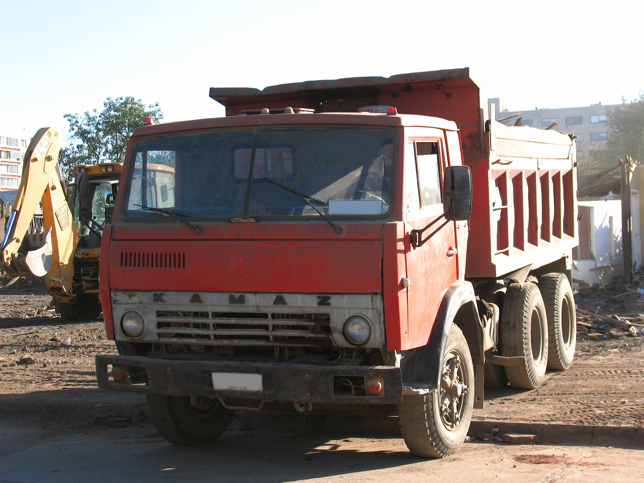 Kamaz 54112 1995